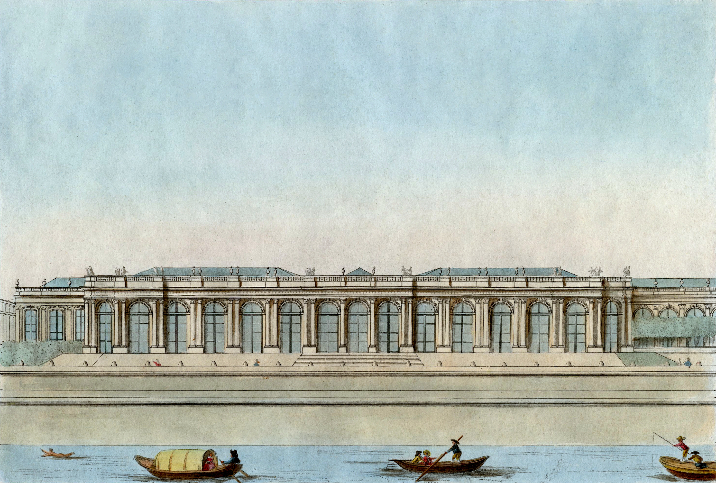 Palais Bourbon, Paris, France.